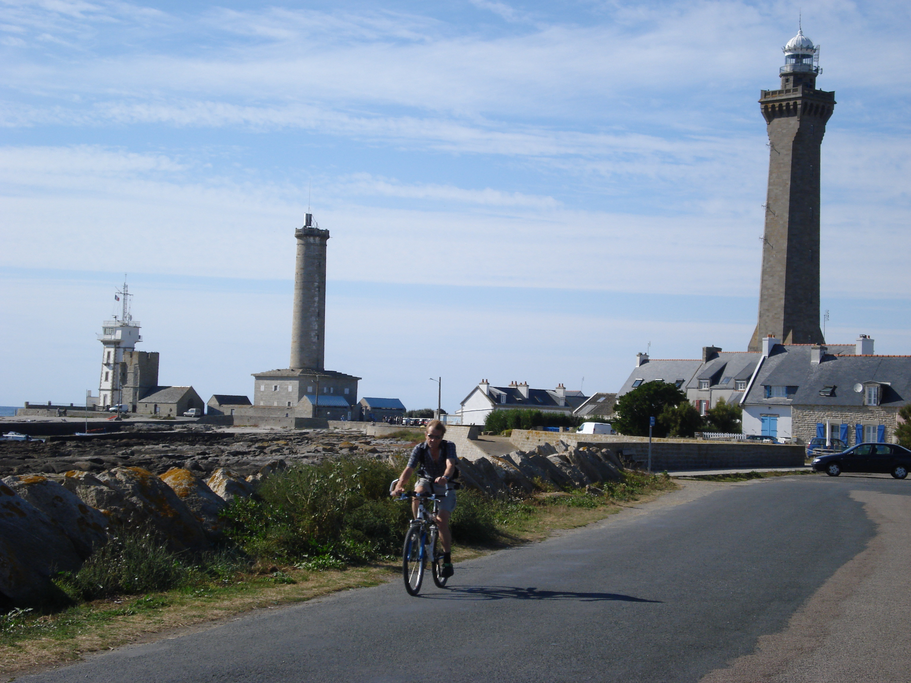 Phares Pointe de Penmarc'h, Finistère, Bretagne, France.